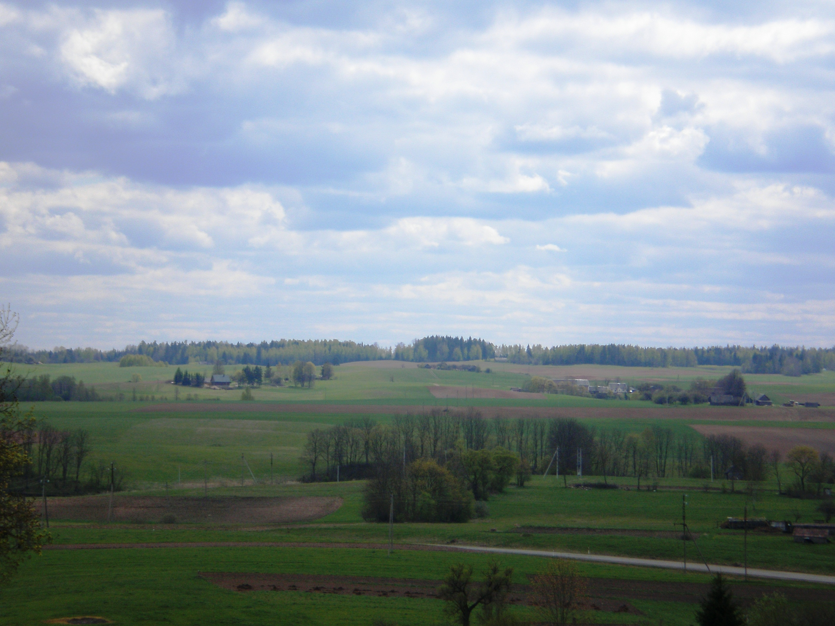 Alantos seniūnijos gamtovaizdis šalia Alantos 2007.05.05 Foto: Hugo.arg